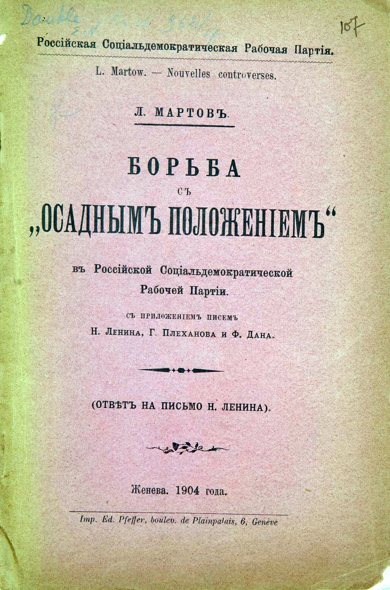 Мартов, Л. Борьба с 'осадным положением' в Российской социалистической рабочей партии. С приложением писем Н. Ленина, Г. Плеханова и Ф. Дана. (Ответ на письмо Н. Ленина) / Л. Мартов. Женева: б.и., 1904. VIII, 96 с.; 18,2х12,2 см.